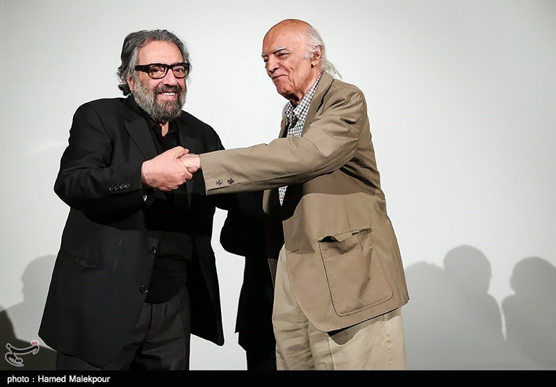 بزرگداشت ناصر تقوایی در خانه هنرمندان ایران